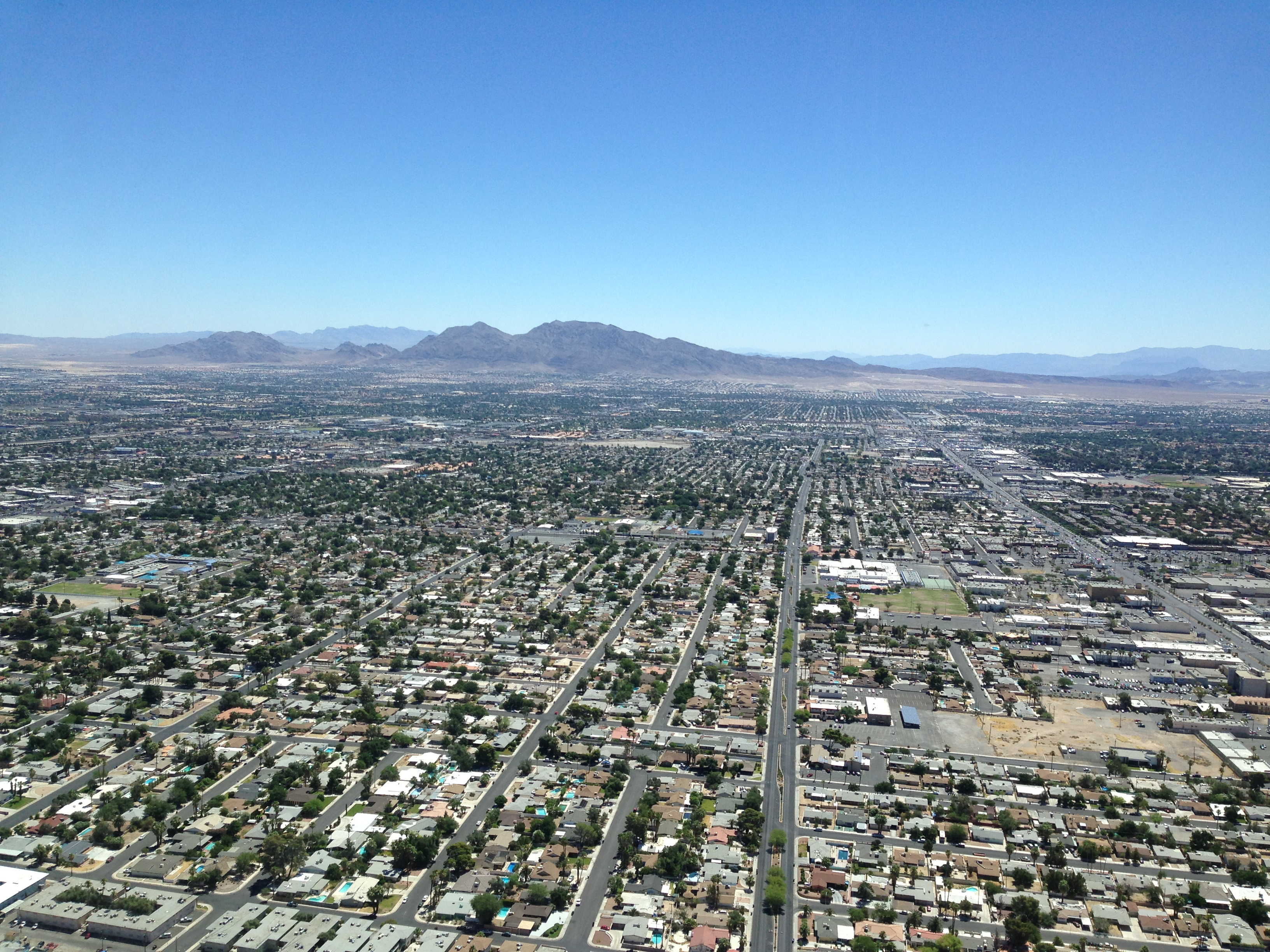 Las Vegas skylines